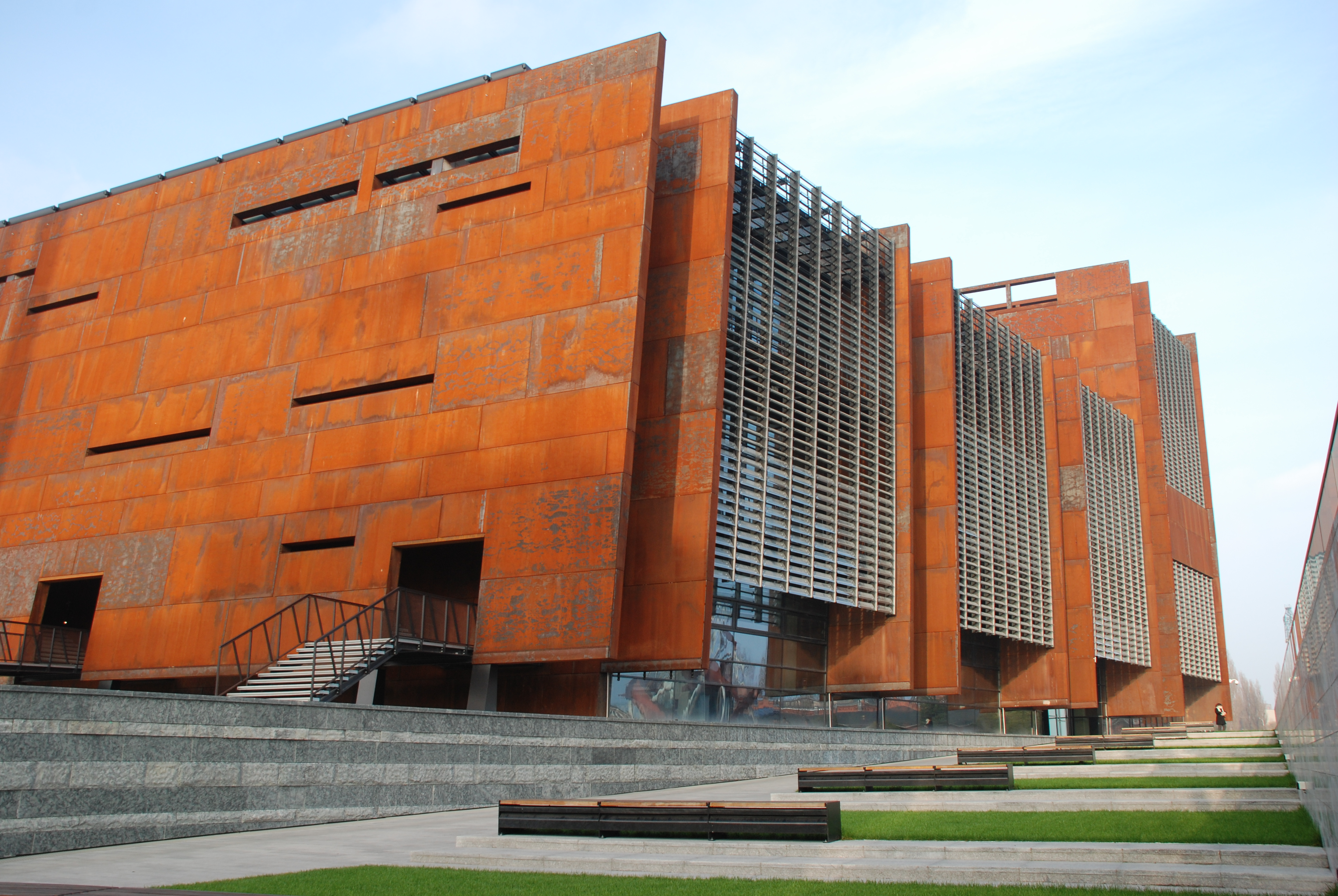 Budynek Europejskiego Centrum Solidarności w Gdańsku